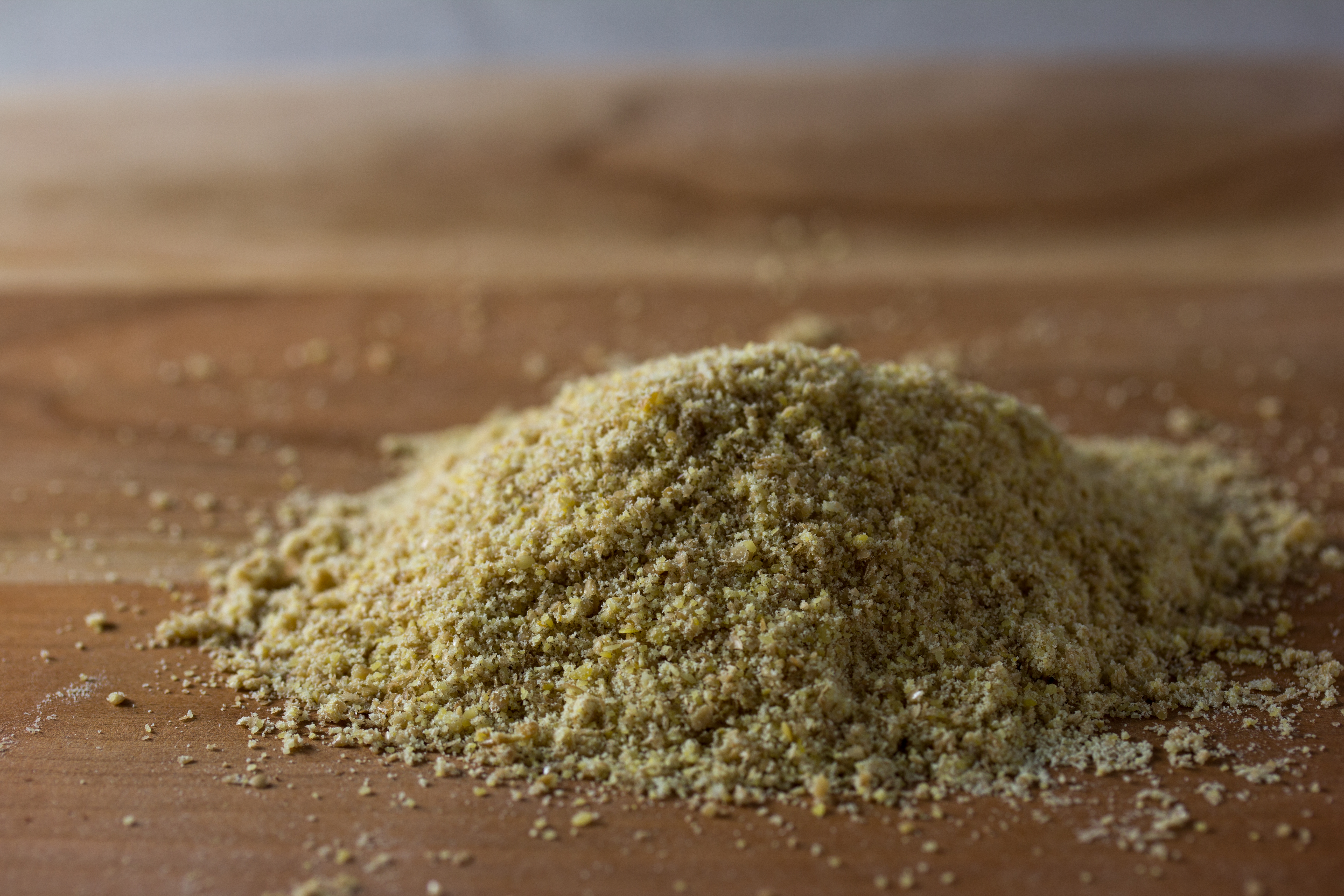 Ground Golden Flax Seeds